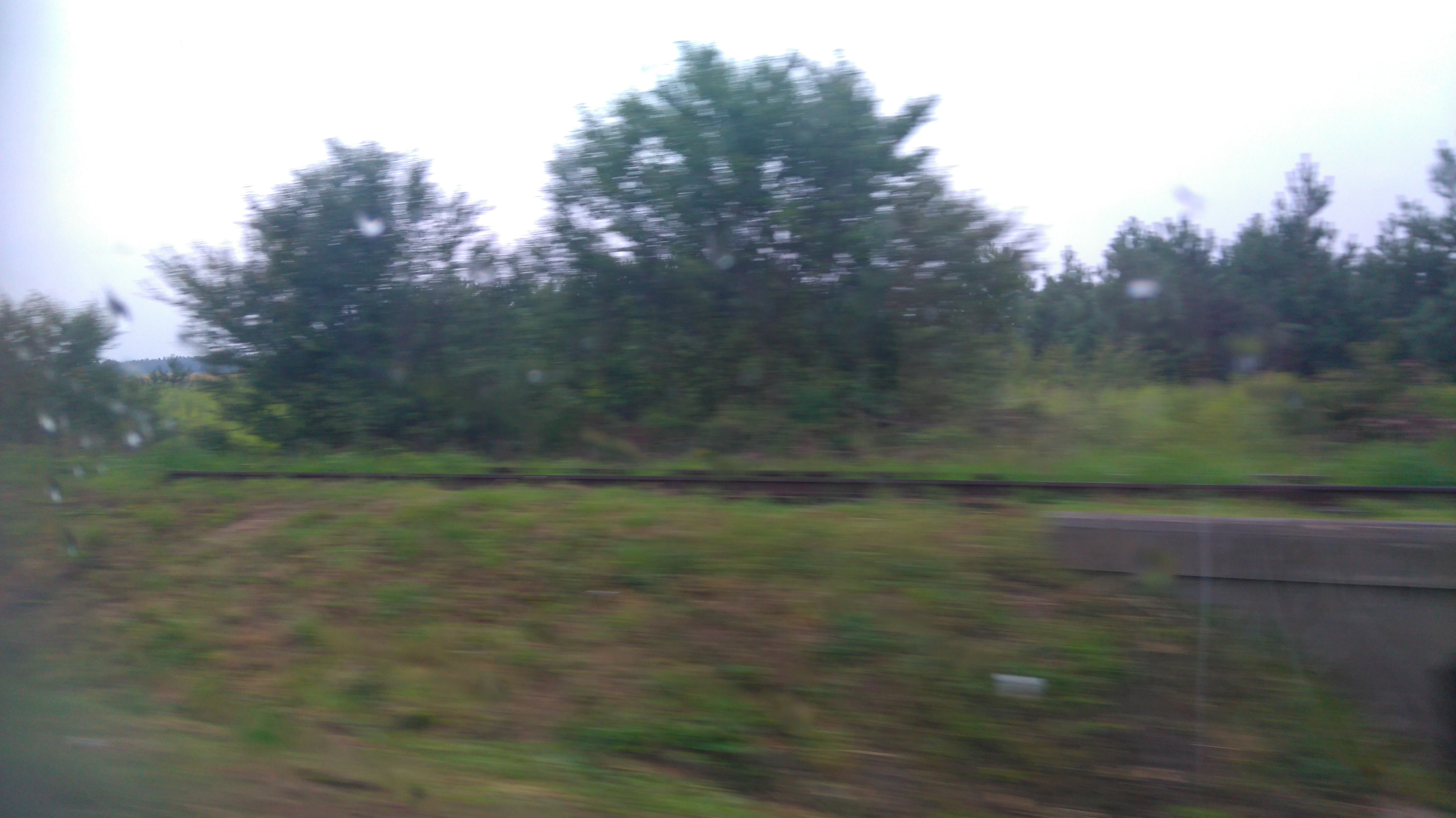 Fragment torów w kierunku Starachowic, zdjęcie zrobione niedaleko dworca w Iłży